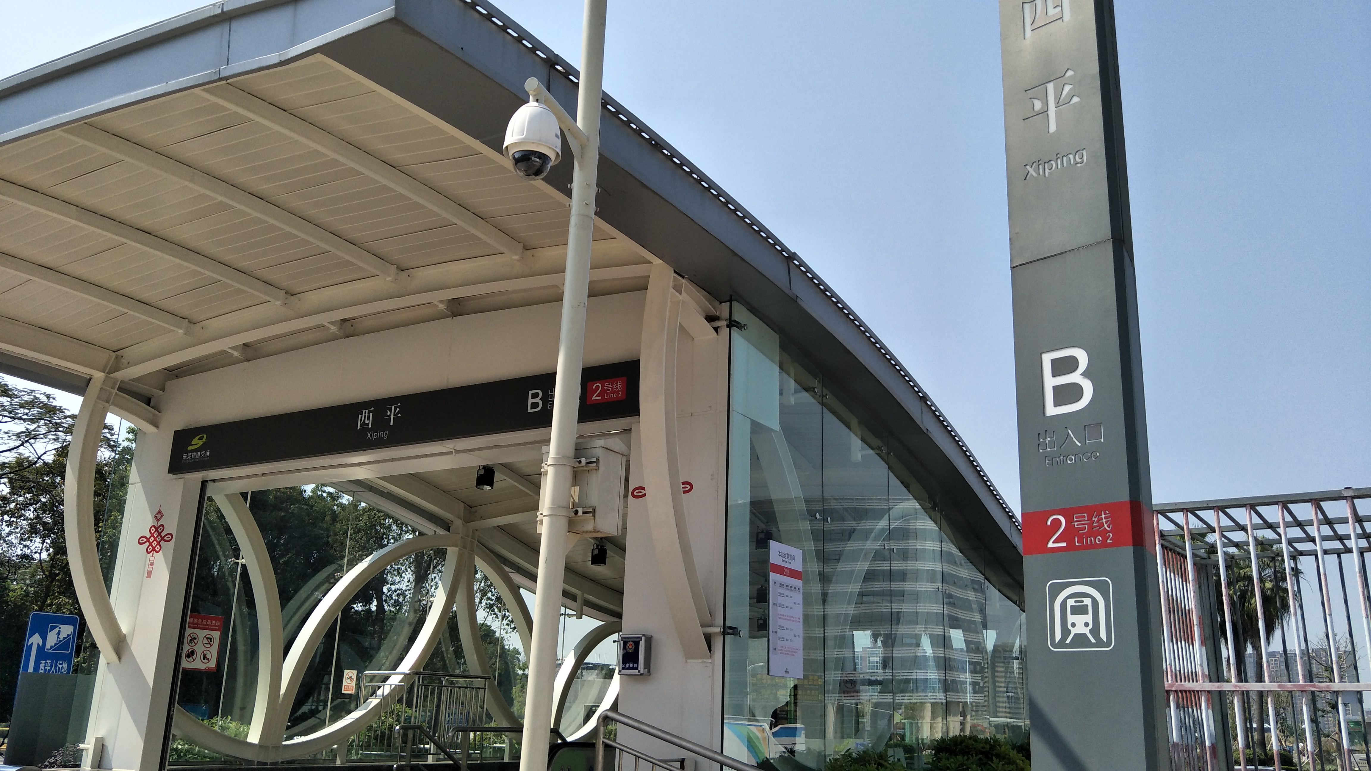 西平站B出口